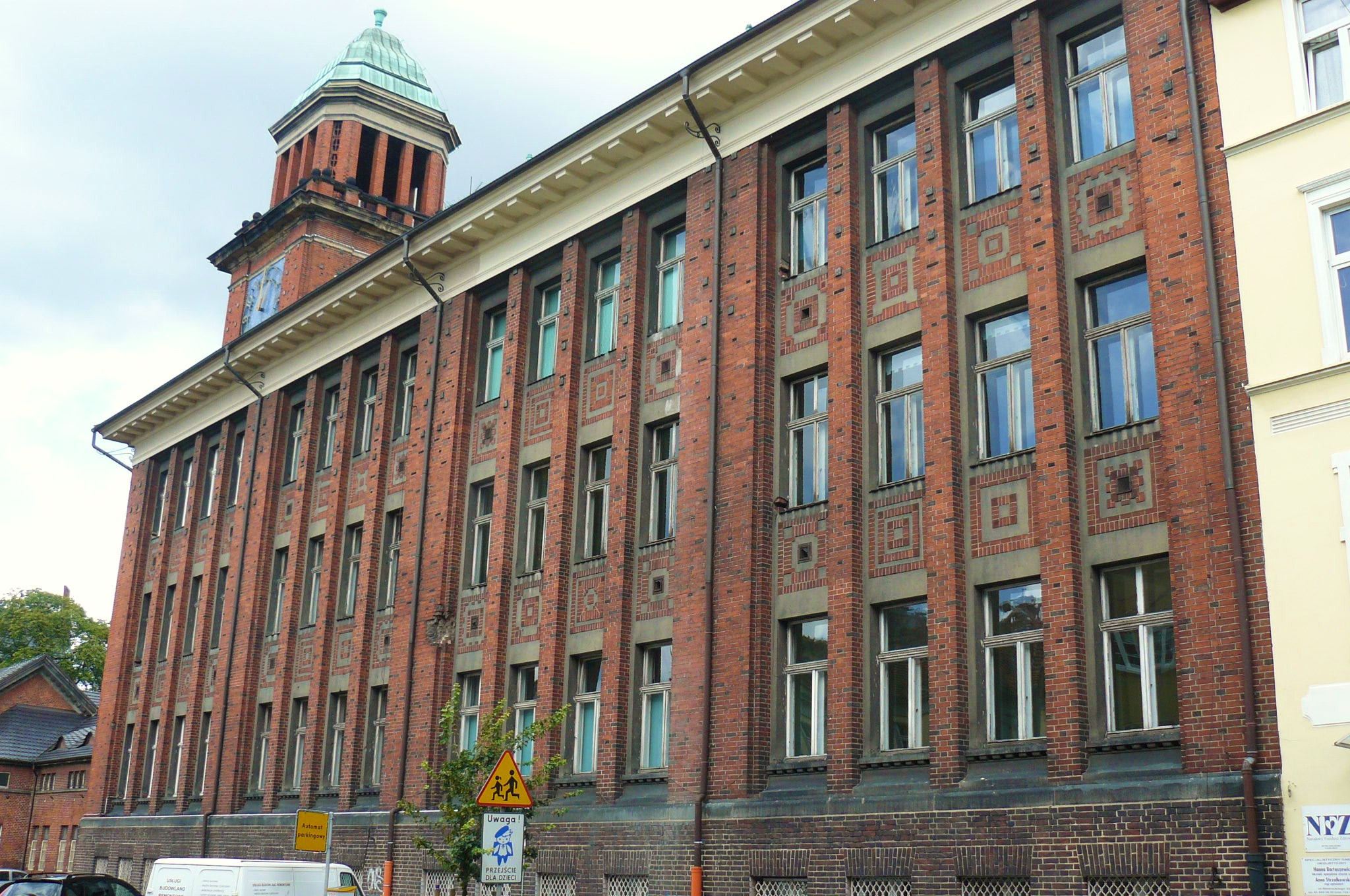 Poznań Jeżyce, ul. Słowackiego 54/60 - Szkoła Podstawowa nr 36 im. Henryka Sucharskiego, zespół zabudowań szkolnych